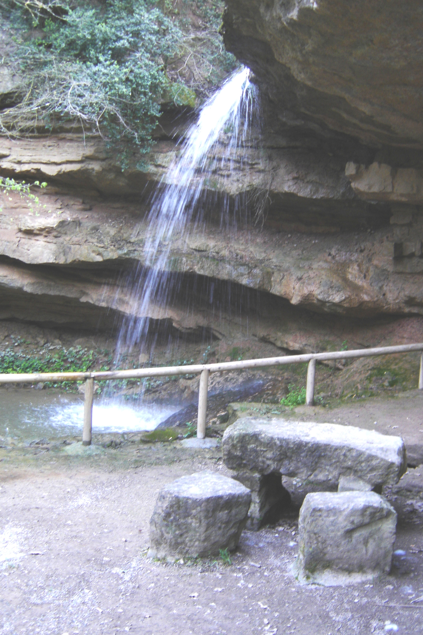 L'entorn de la font de la Mina, a Solsona (Solsonès). Taula, cascada i toll